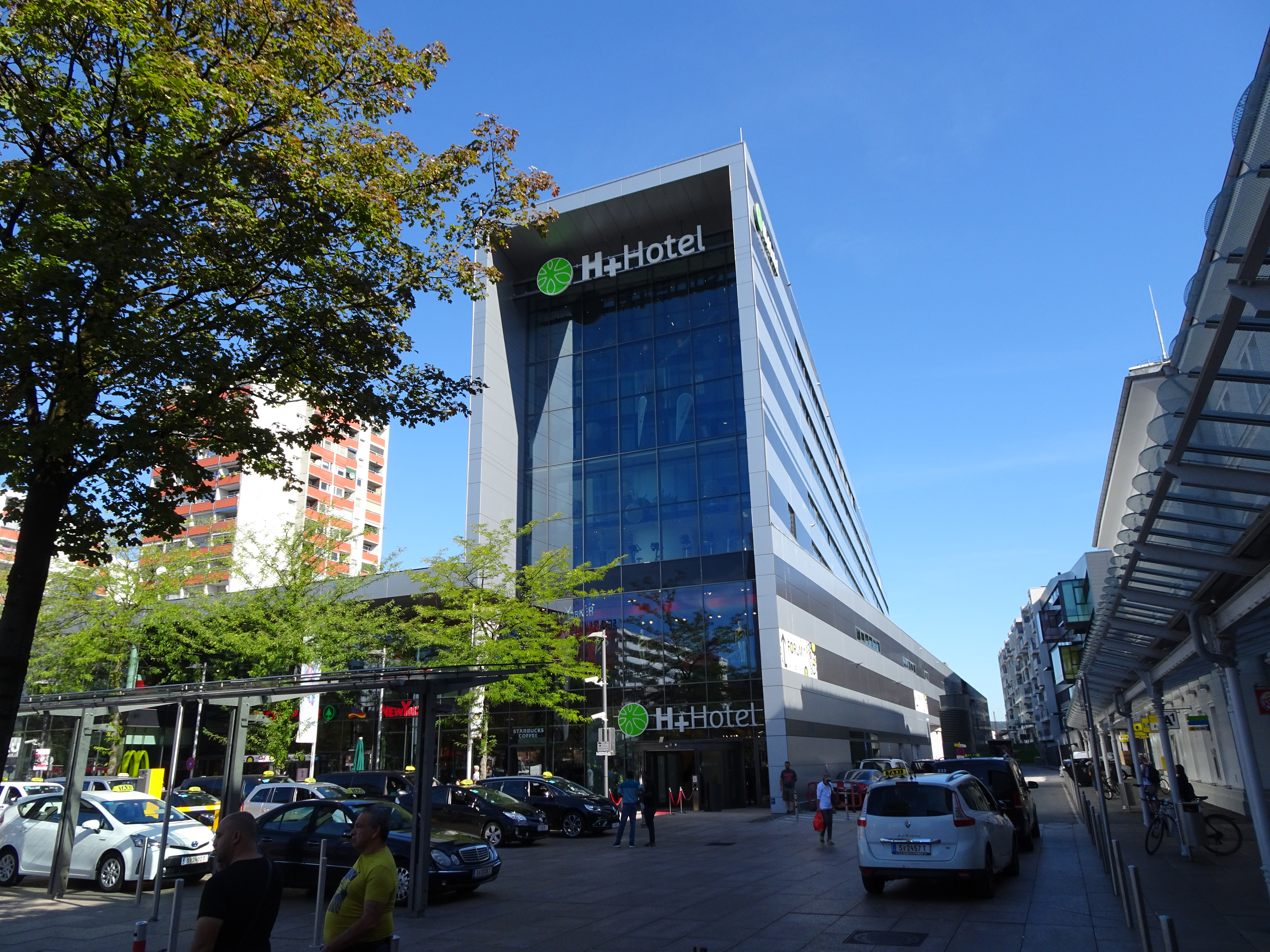 H+Hotel in Satzburg